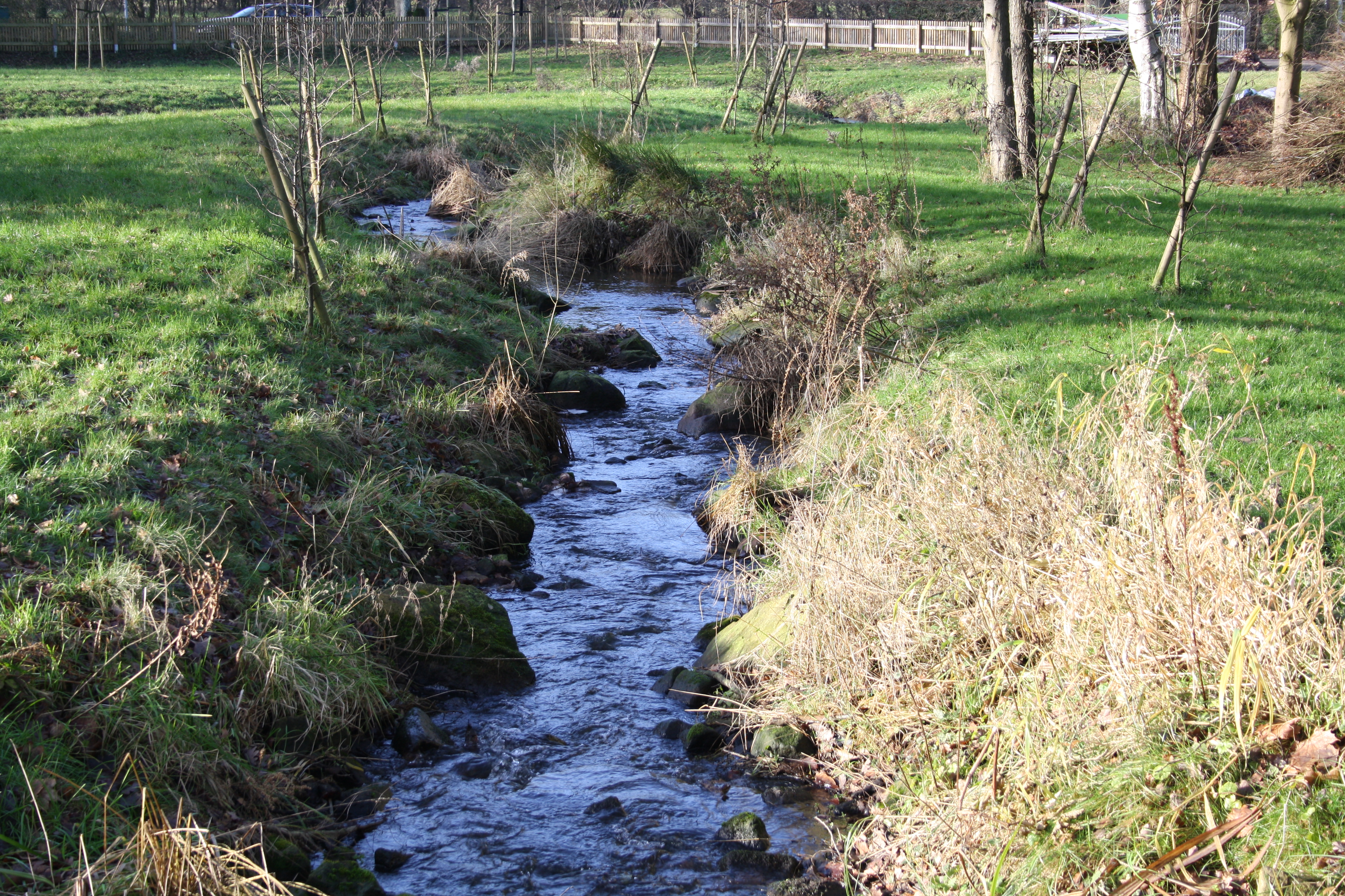 Umgehungsgerinne des Mühlenwehrs an der Schönebecker Aue (Bremen-Schönebeck)